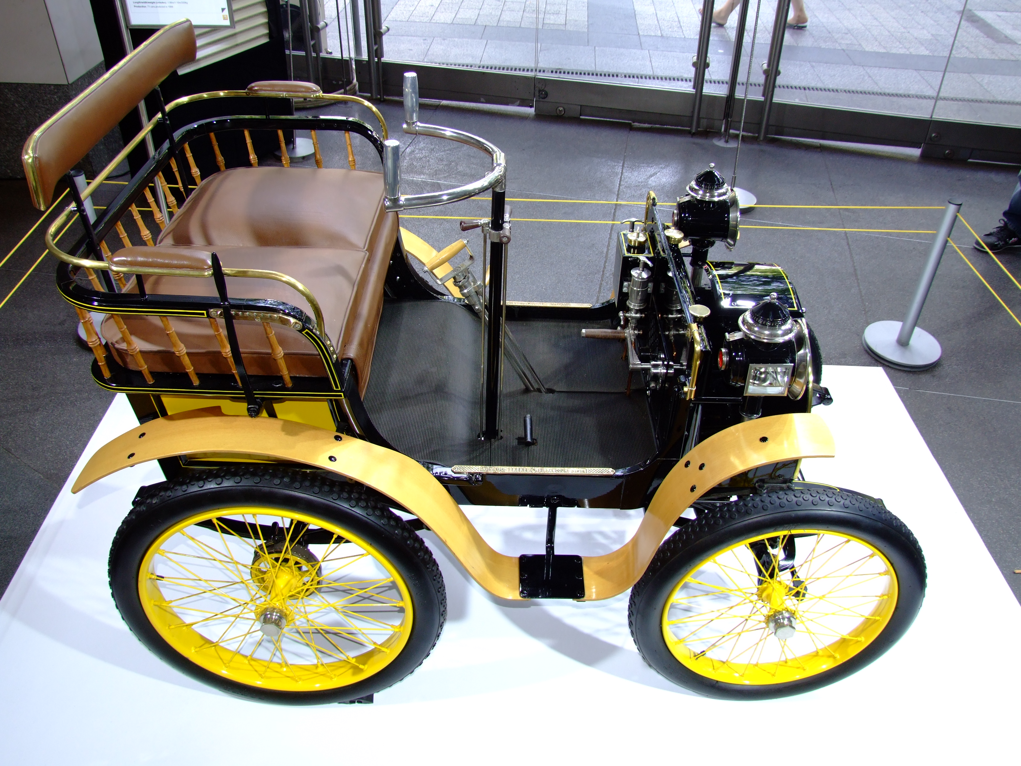 Renault at Paris